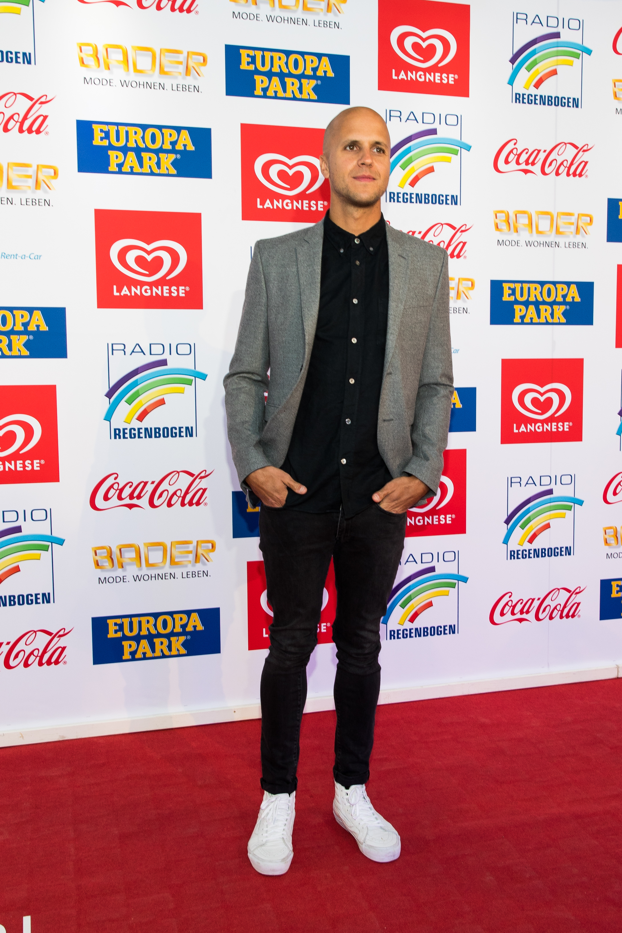 during Radio Regenbogen Award 2017 at Europapark, Rust, Baden-Württemberg, Germany on 2017-04-07, Photo: Sven Mandel